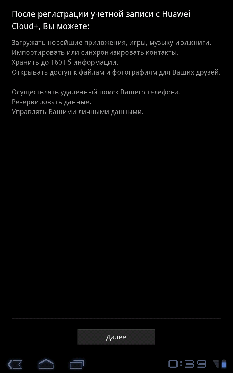 Регистрация учётной записи в сервисе Huawei HiSpace Cloud+.